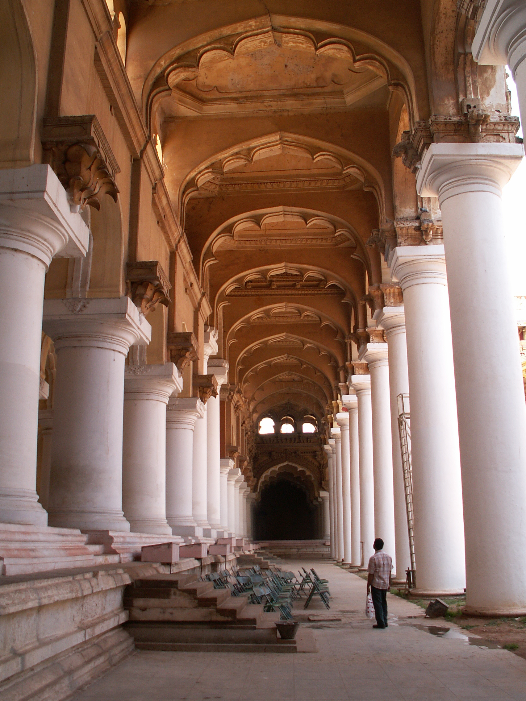 Thirumalai Nayak Palace, Madurai